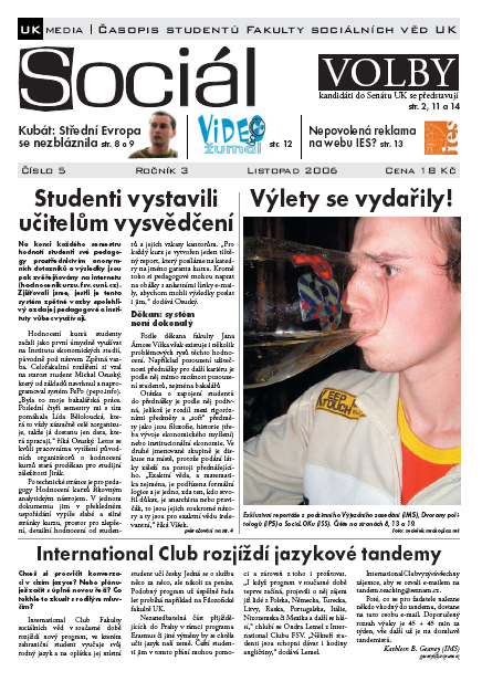 Titulní strana časopisu Sociál (listopad 2006)